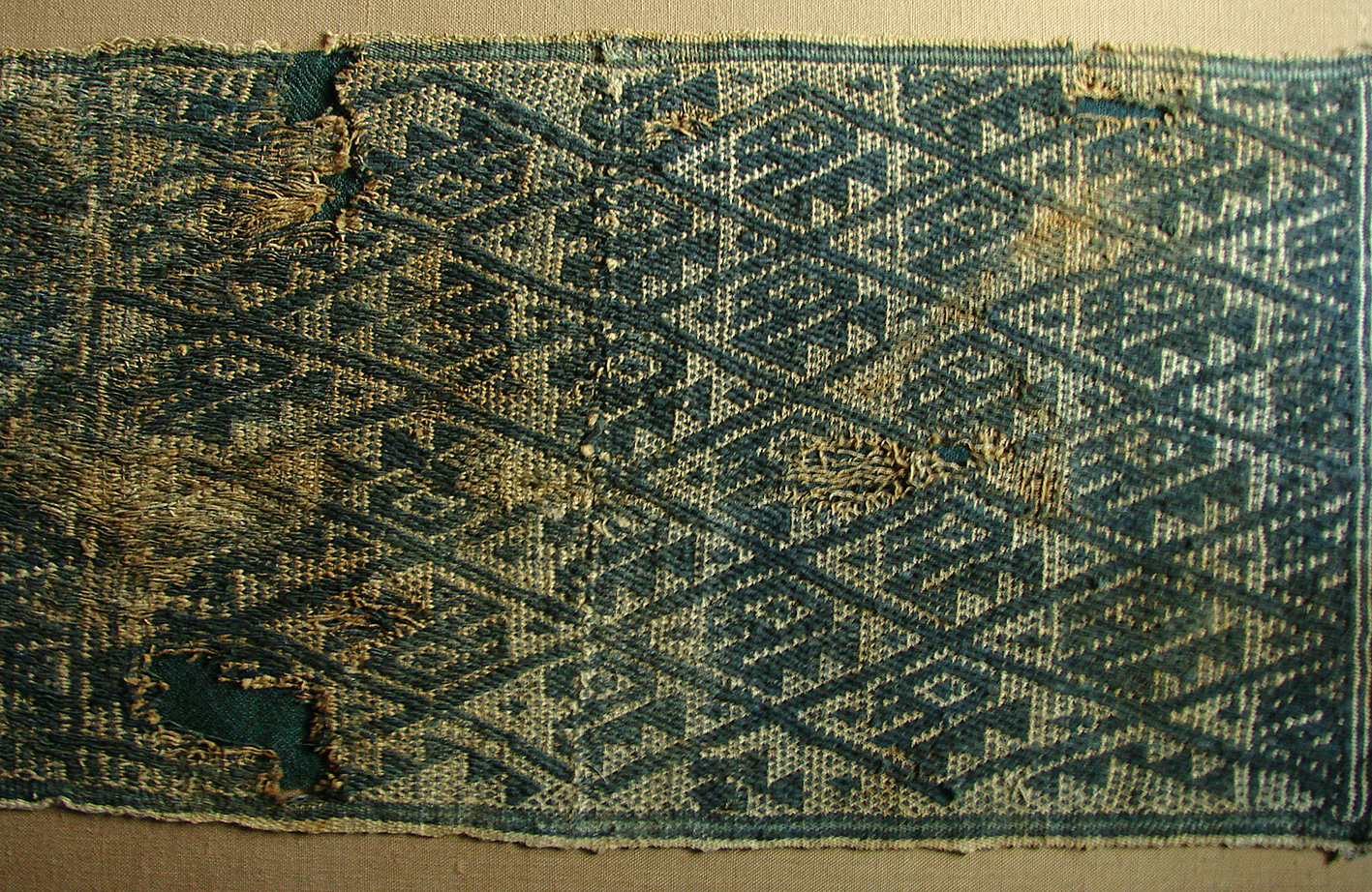 Tissu de la culture Chancay (1200-1450 + JC). Il s'agit d'une des cultures pré-Inca, située au Pérou.Musée d'Auch.